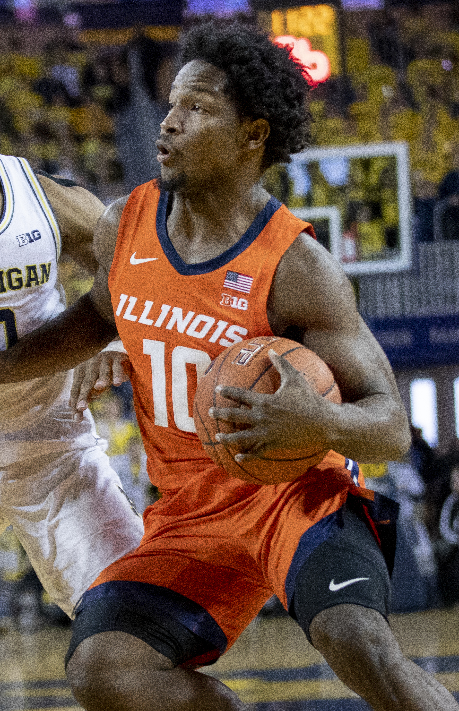 _O6A0834